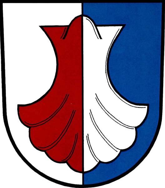 Znak Obce Velká Losenice